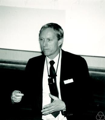 Foto di Ronald Graham